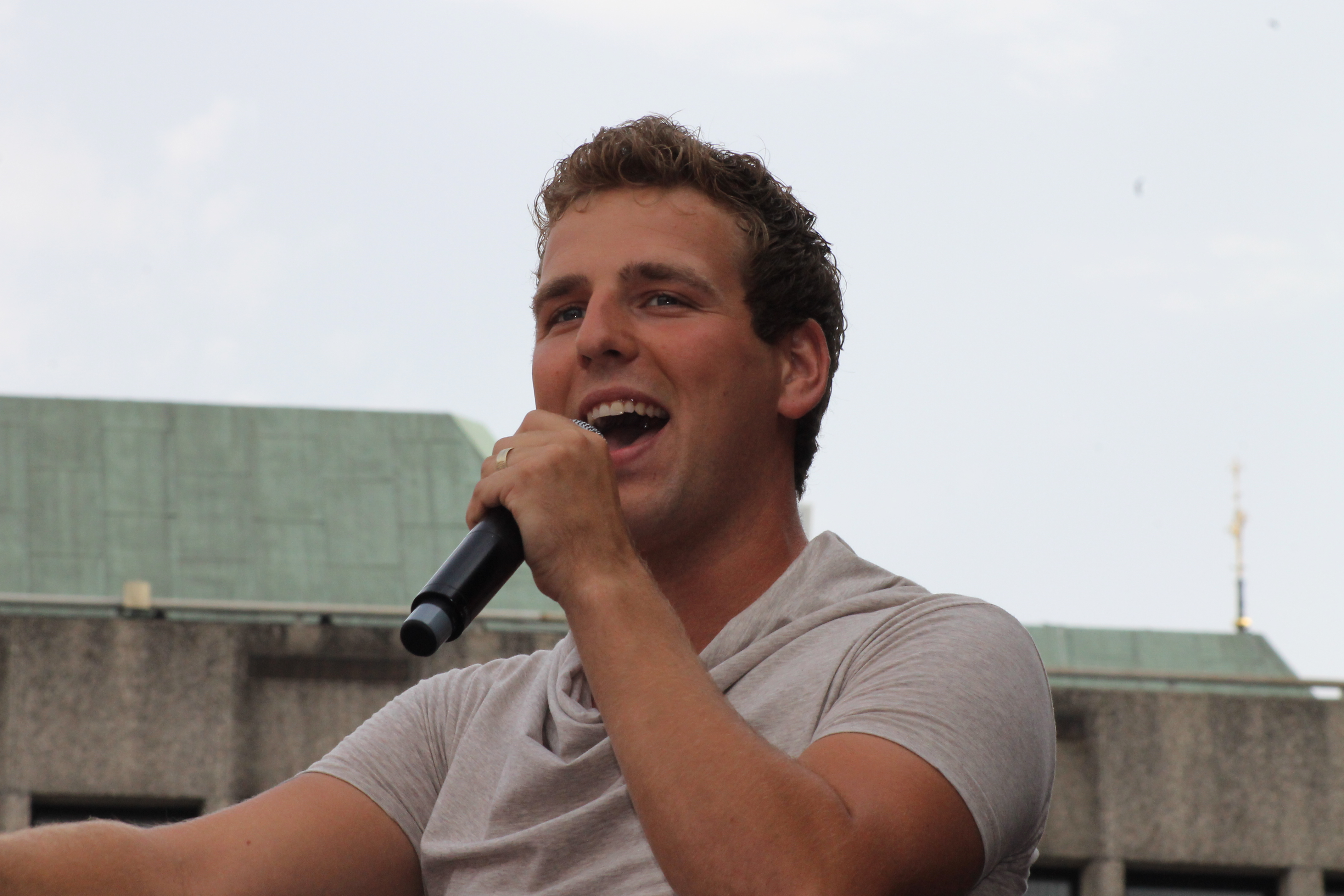 Wesley Klein tijdens optreden bij Hart voor Muziek in Eindhoven